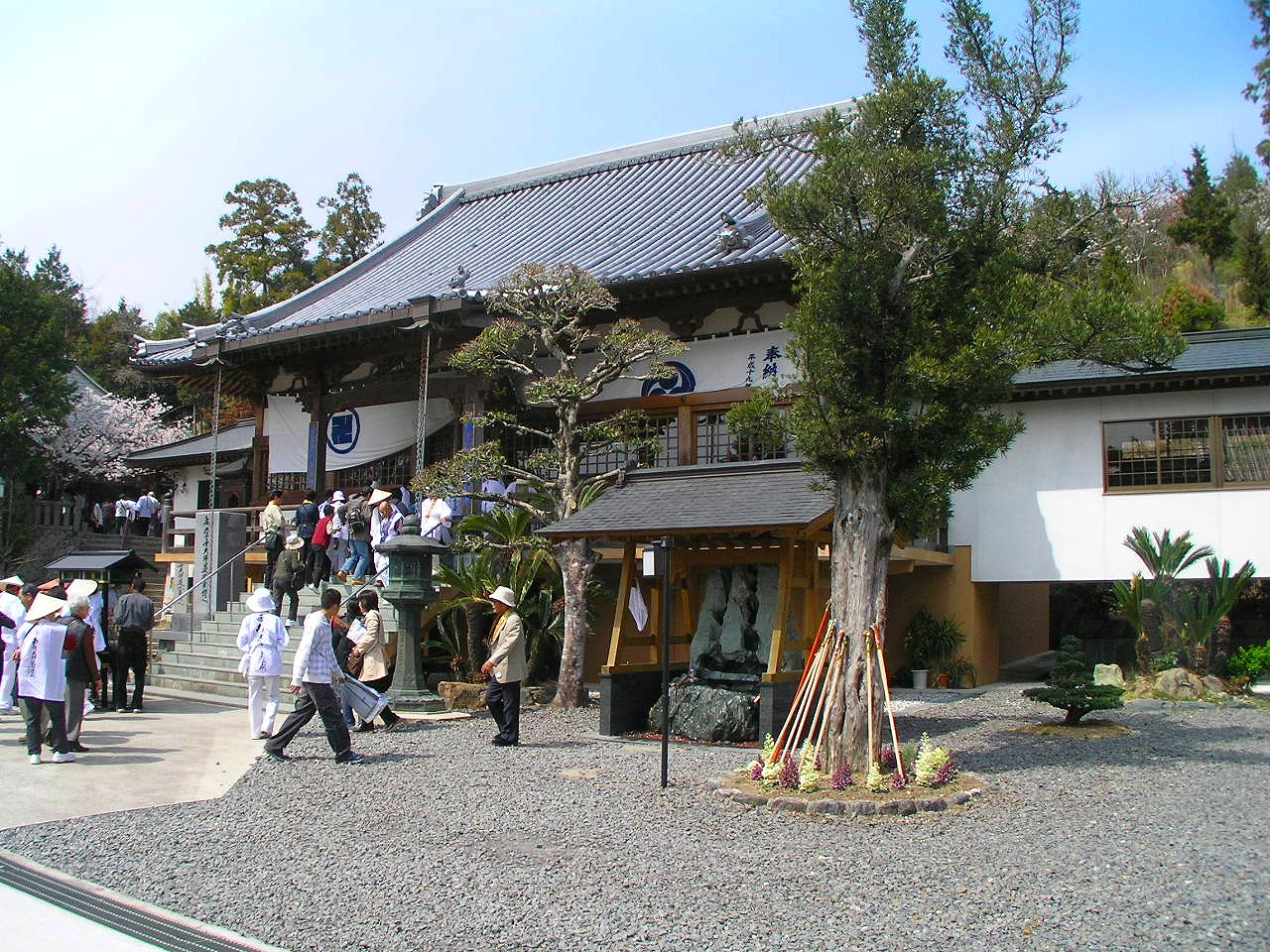 7番十楽寺本堂 十楽寺（じゅうらくじ）は徳島県阿波市土成町高尾にある高野山真言宗の寺院。四国八十八箇所霊場の第7番札所。光明山（こうみょうざん）蓮華院（れんげいん）と号する。本尊は阿弥陀如来。竜宮城を思わせる美しい朱ぬりの鐘楼門がある。